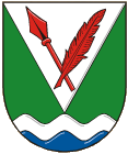 Znak obce Střítež nad Ludinou